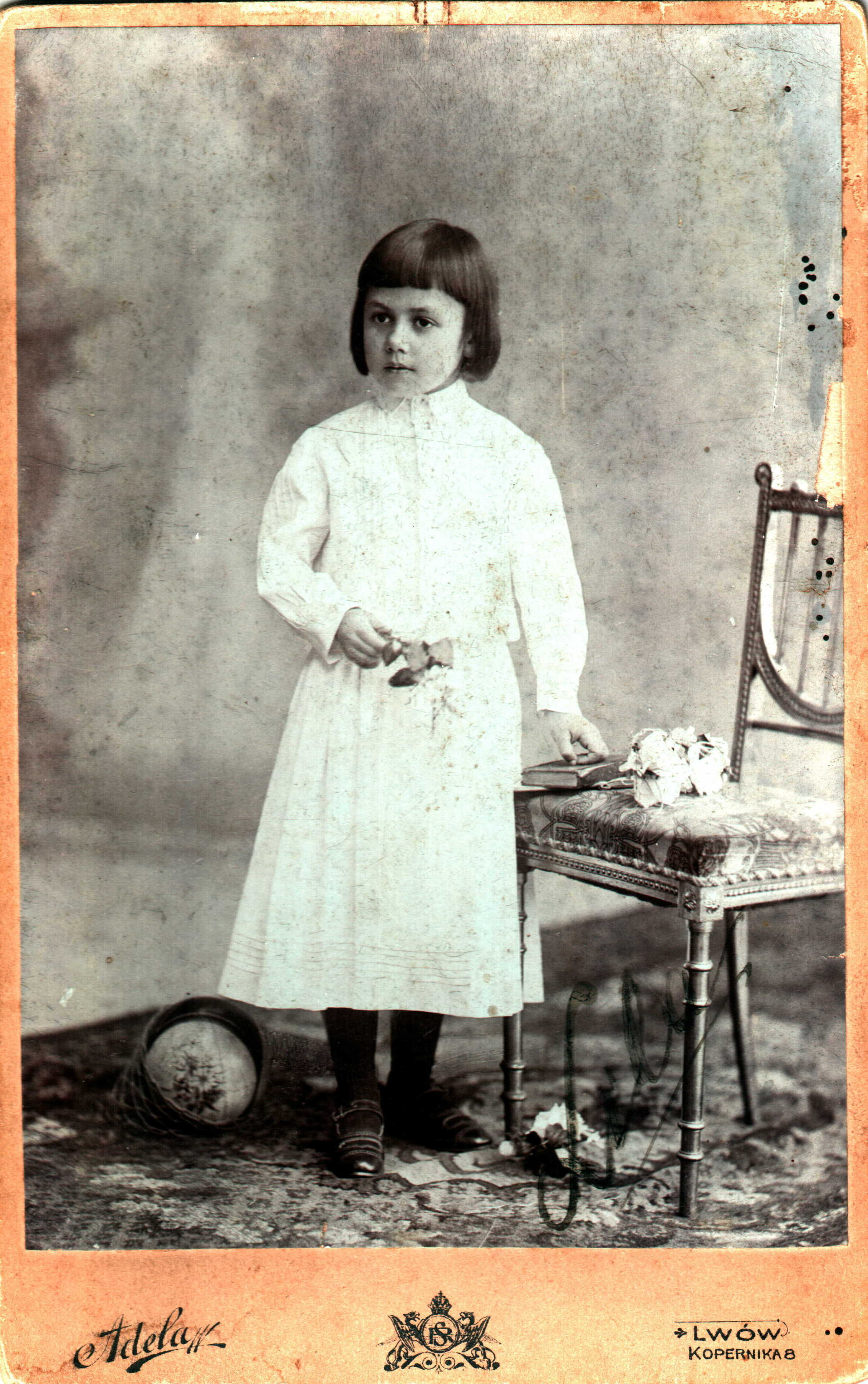 Pierwsza komunia Felicji Żurowskiej około 1902 r.